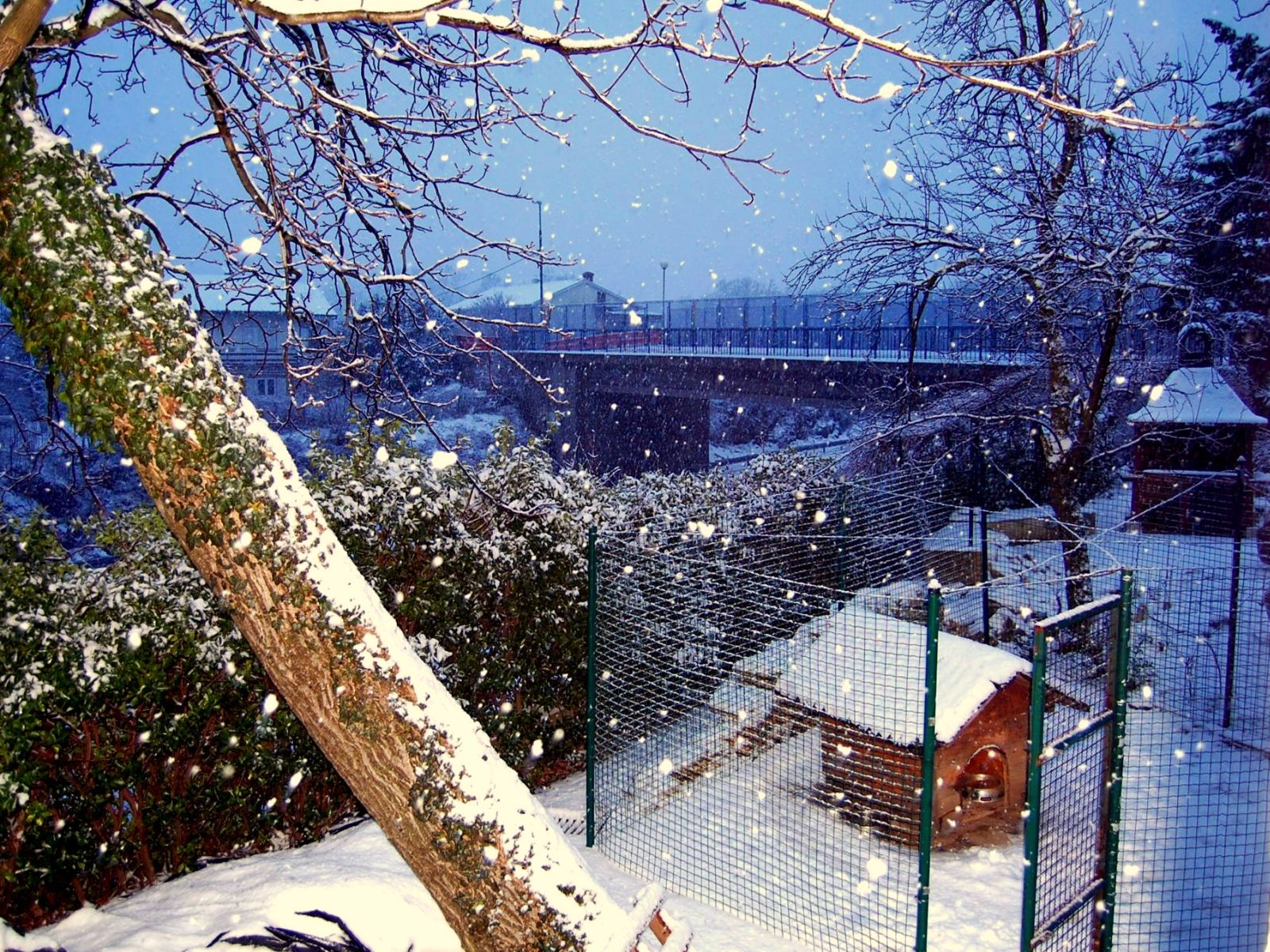 Čavle & snow